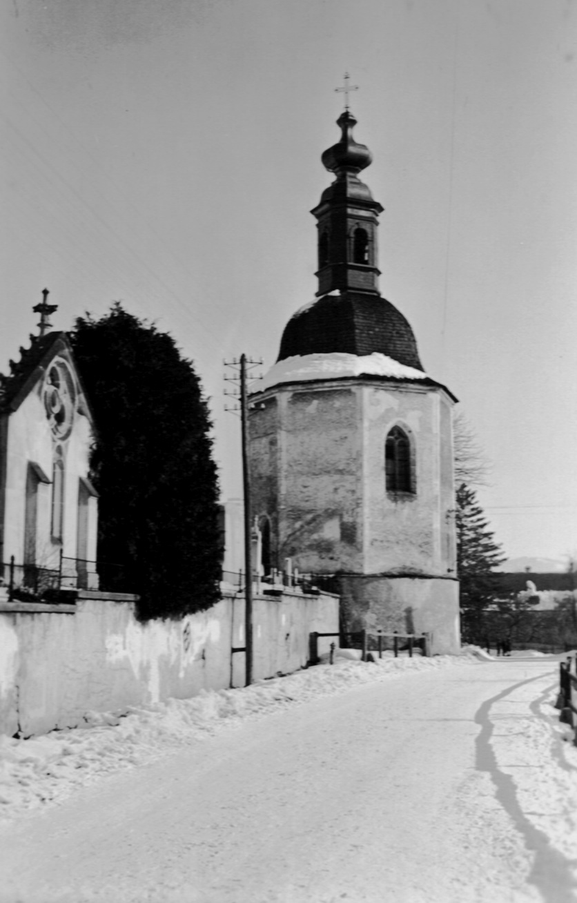 Karner von Aflenz Kurort